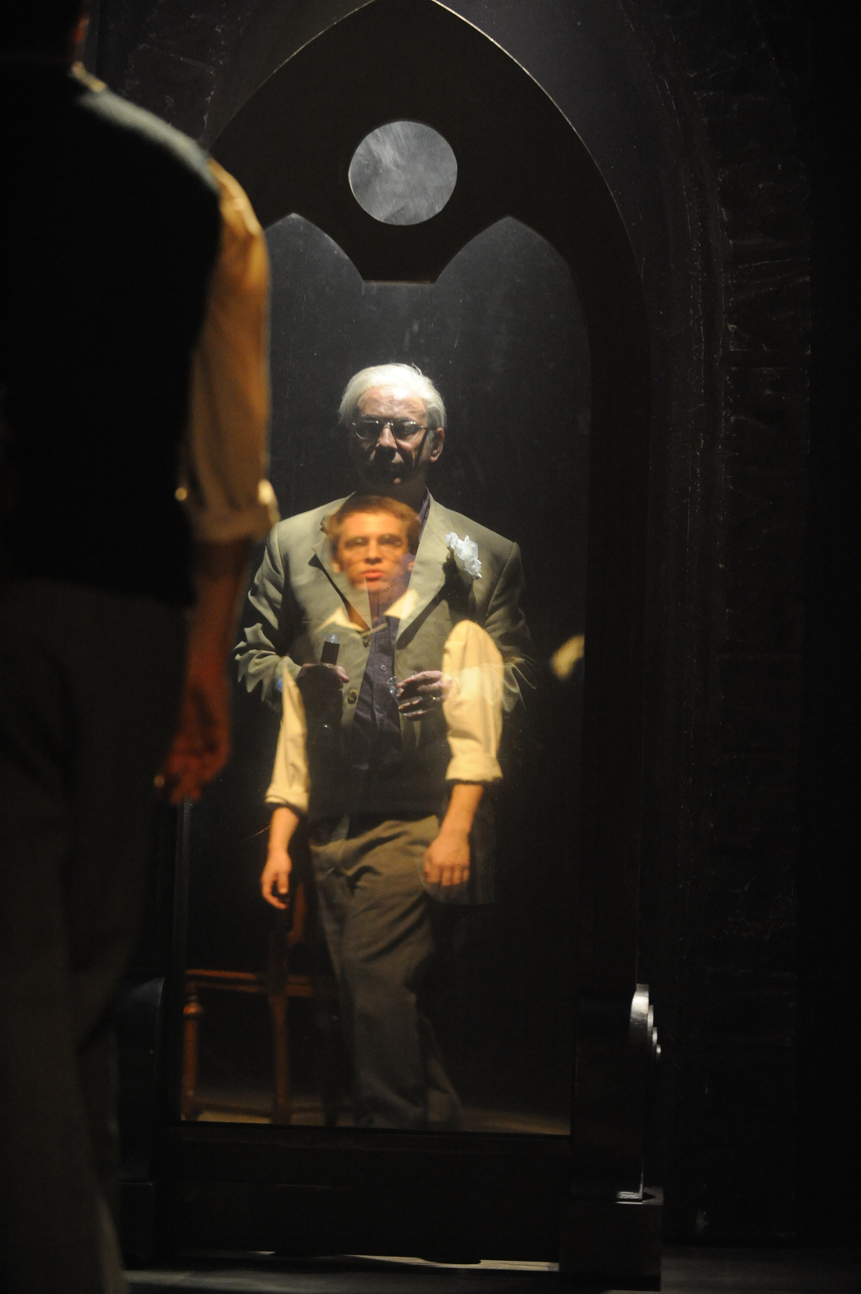 ויצמן הזקן וויצמן הצעיר מביטים במראה, בהצגה "אהובת הדרקון", מאת ובבימויו של מיקי גורביץ', תיאטרון החאן